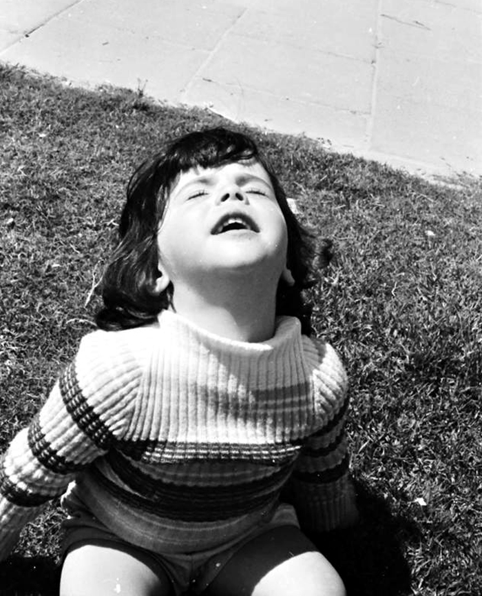 שרית וינו אלעד בילדותה בת שנה